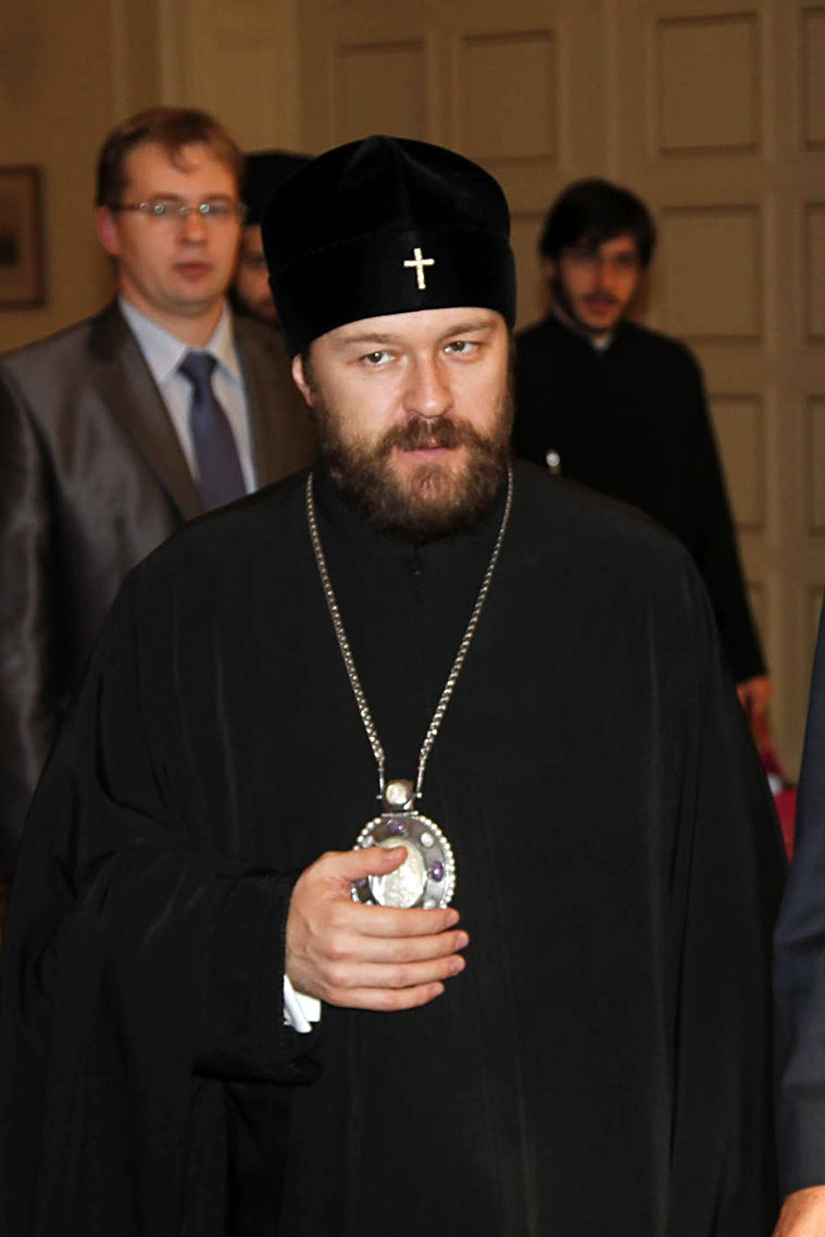 Στις 12 Δεκεμβρίου 2011, ο Υπουργός Εξωτερικών Σταύρος Δήμας είχε συνάντηση με το Μητροπολίτη Βολοκολάμσκ Ιλαρίωνα, Πρόεδρο του τμήματος των Εξωτερικών Εκκλησιαστικών Σχέσεων του Πατριαρχείου Μόσχας.